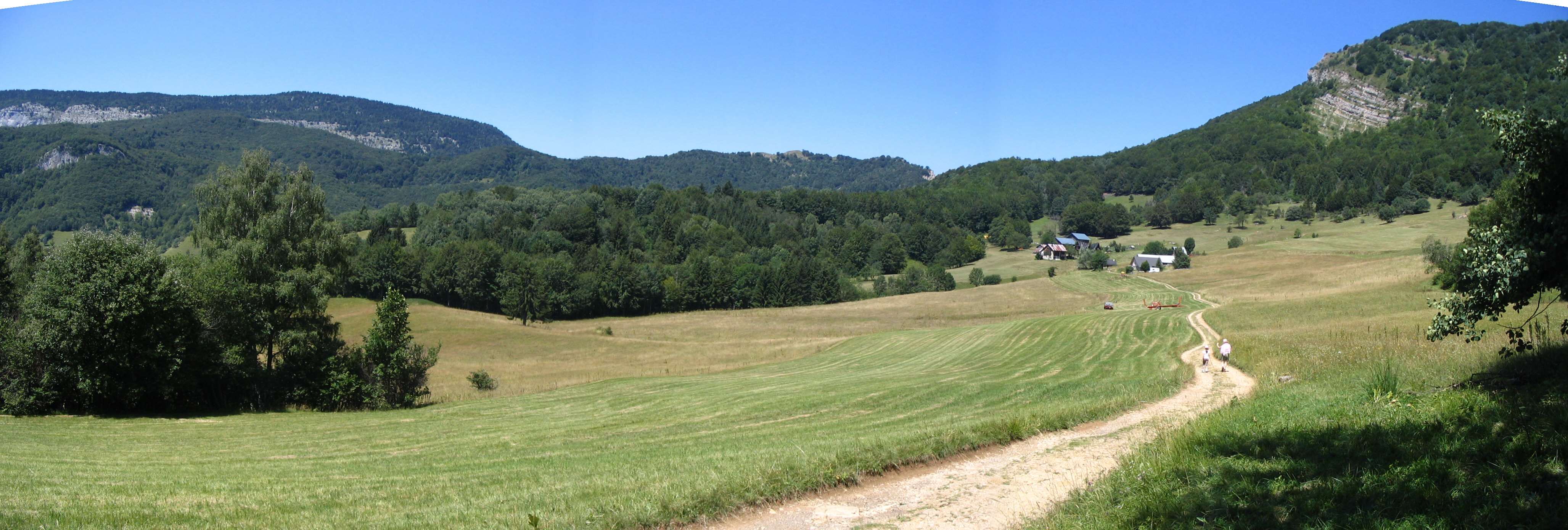 Granges de Joigny - 1190m - Col du Granier - Entremont le Vieux- Massif d la Chartreuse - Savoie France